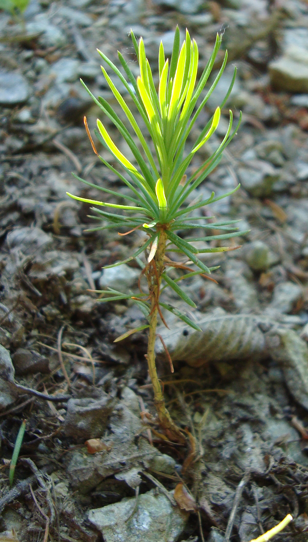 Semenáček modřínu opadavého